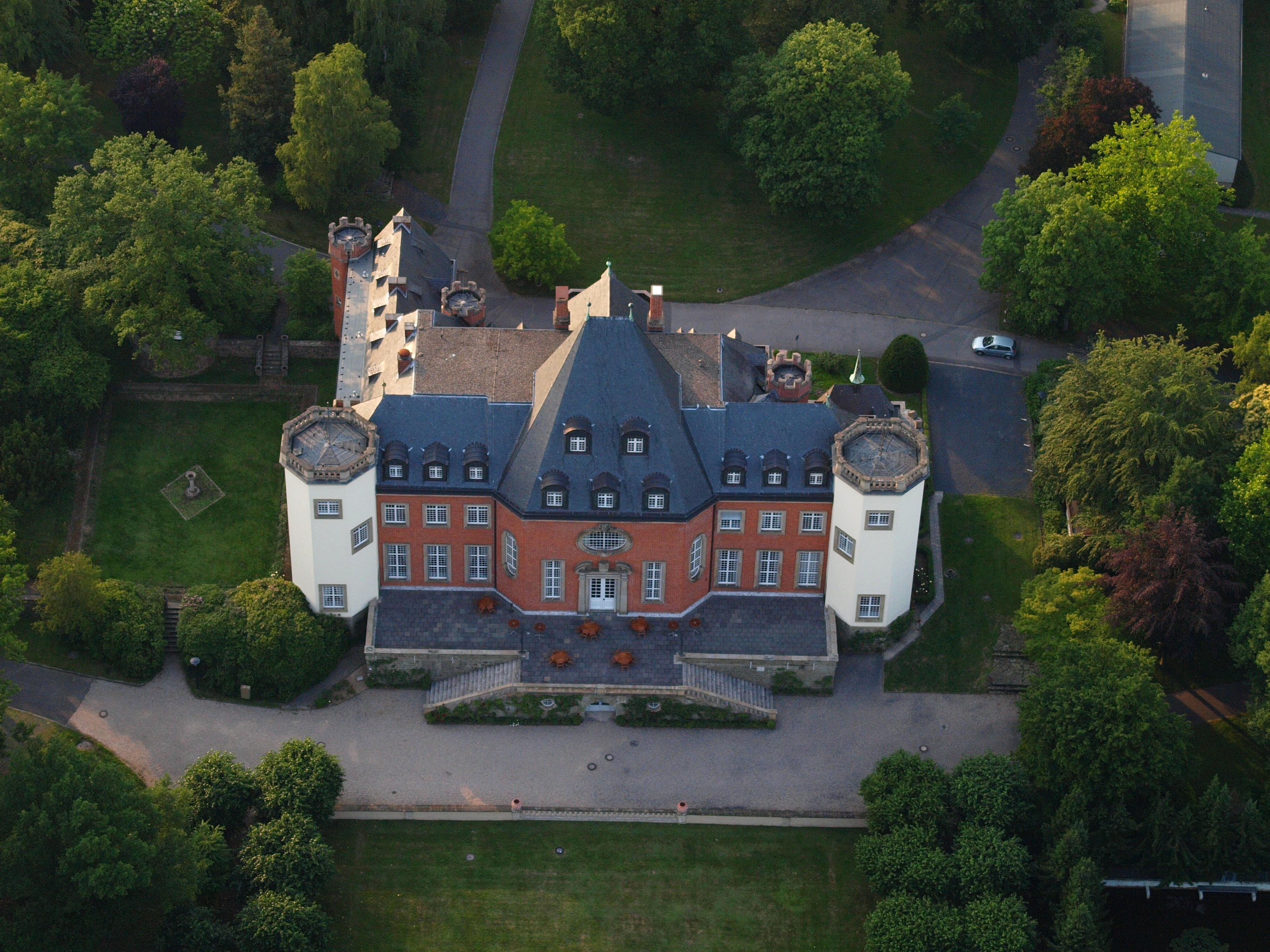 Schloss Birlinghoven: Luftaufnahme